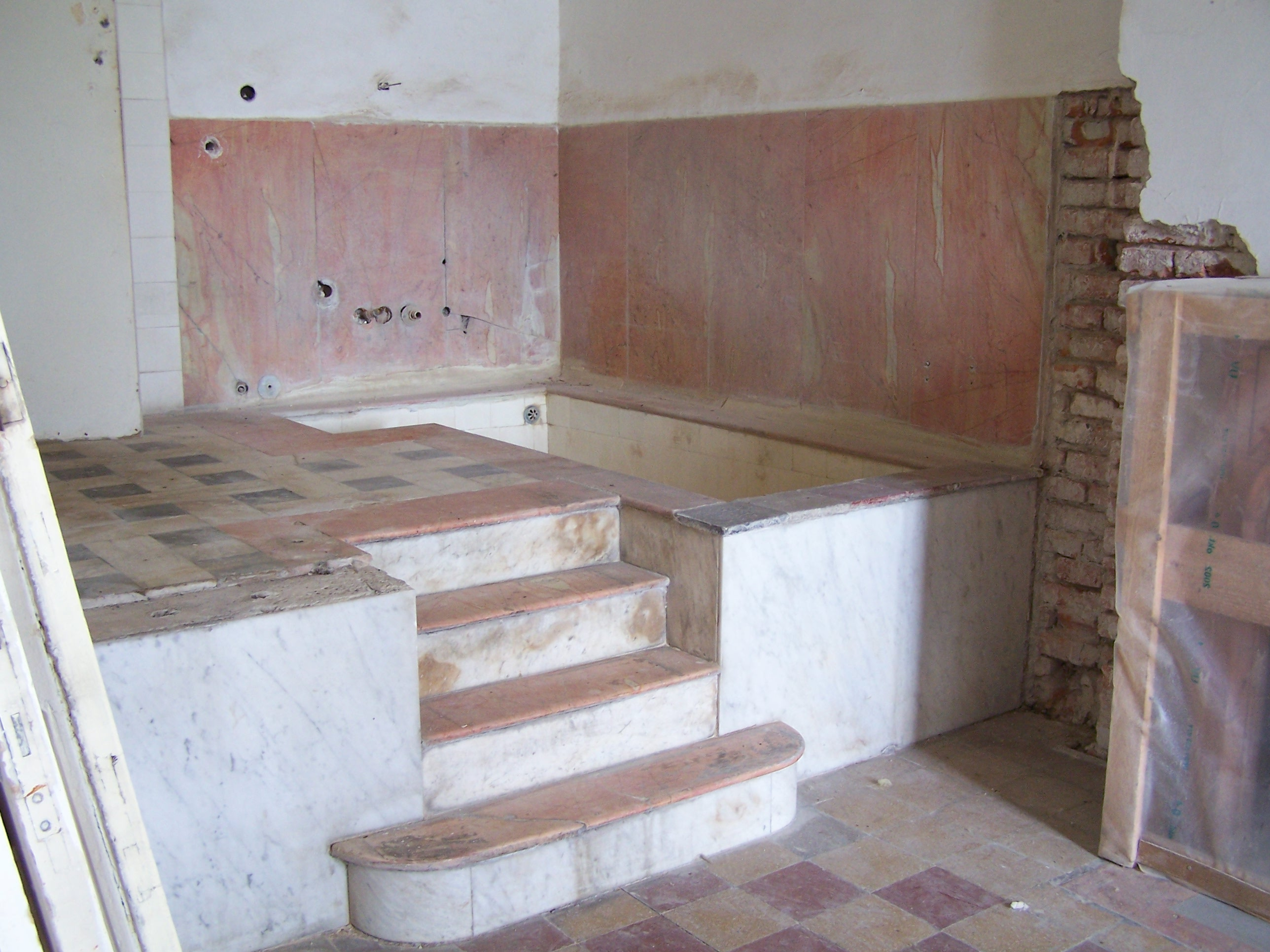 Károlyi-kastély szállodaszárny, fürdőszoba This is a photo of a monument in Hungary. Identifier: 2768